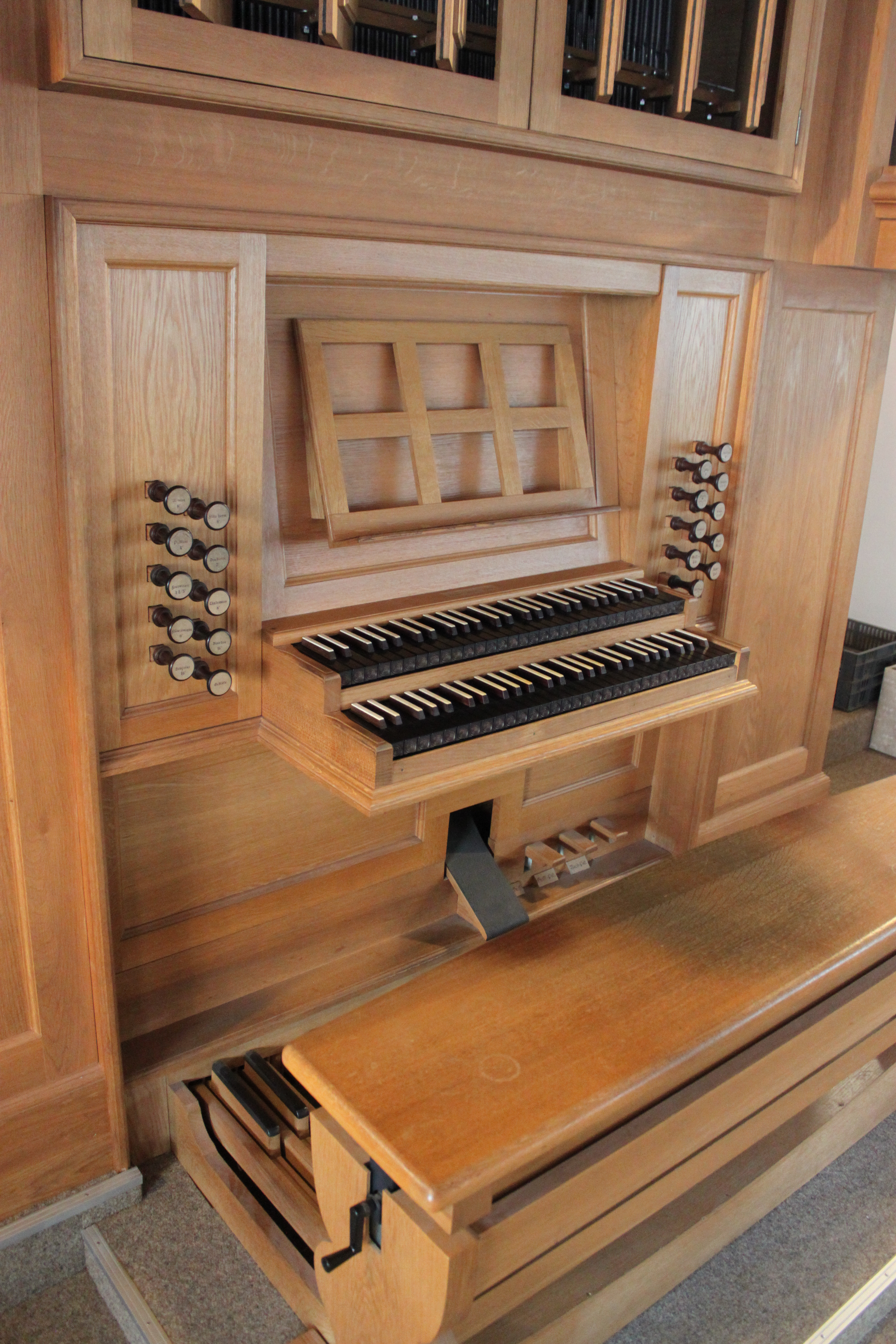 Spielanlage der Orgel der evangelischen Markuskirche, Wien 16., errichtet 1985 von Bruno Riedl